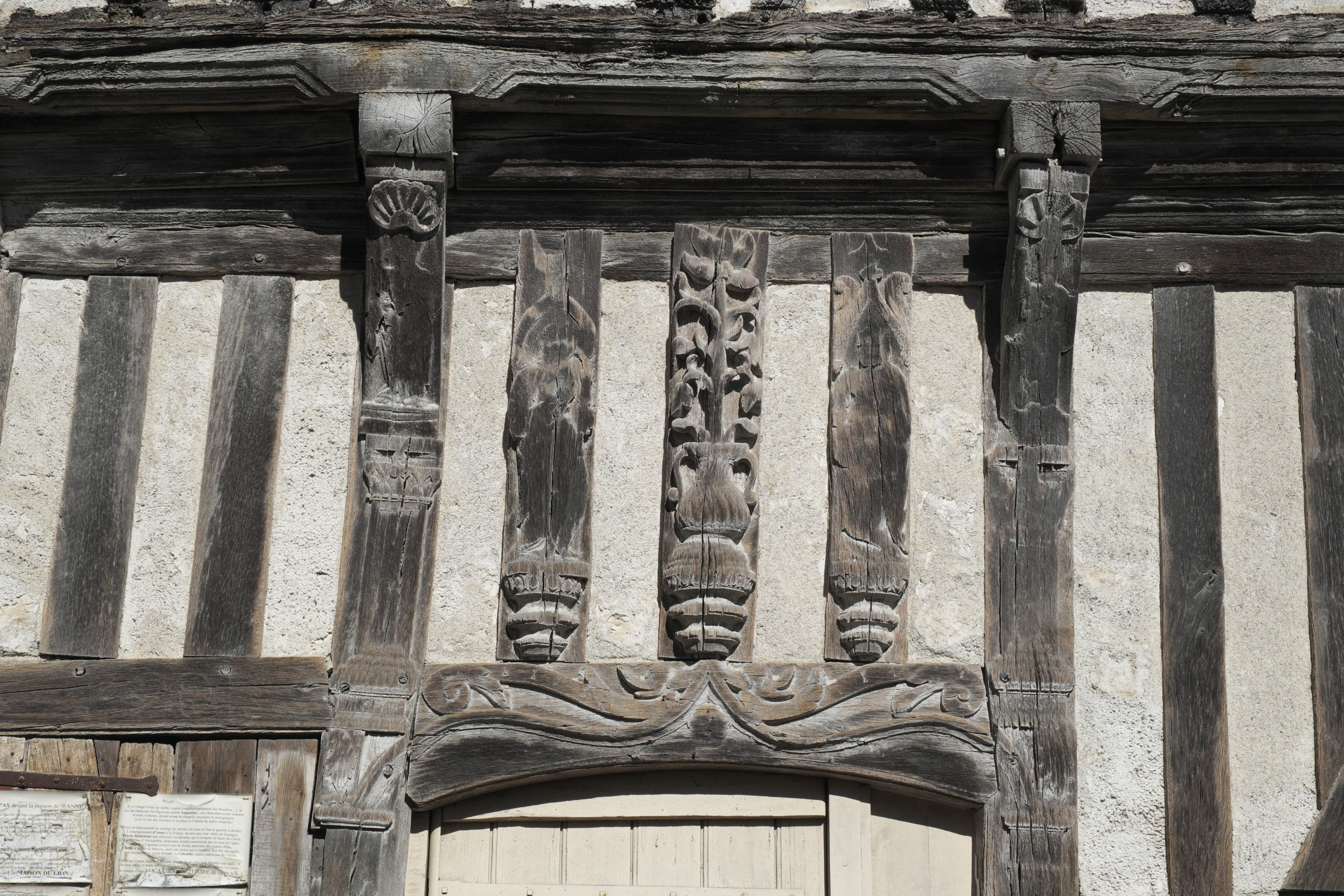 Maison de Jeanne d’Arc (Hostel de Munille) in Bray-sur-Seine im Département Seine-et-Marne (Île-de-France/Frankreich)